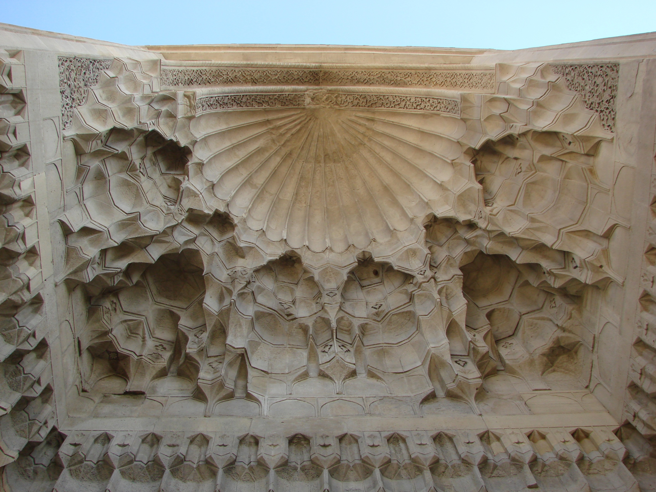 Shirvanshahs palace in Baku, Azerbaijan.